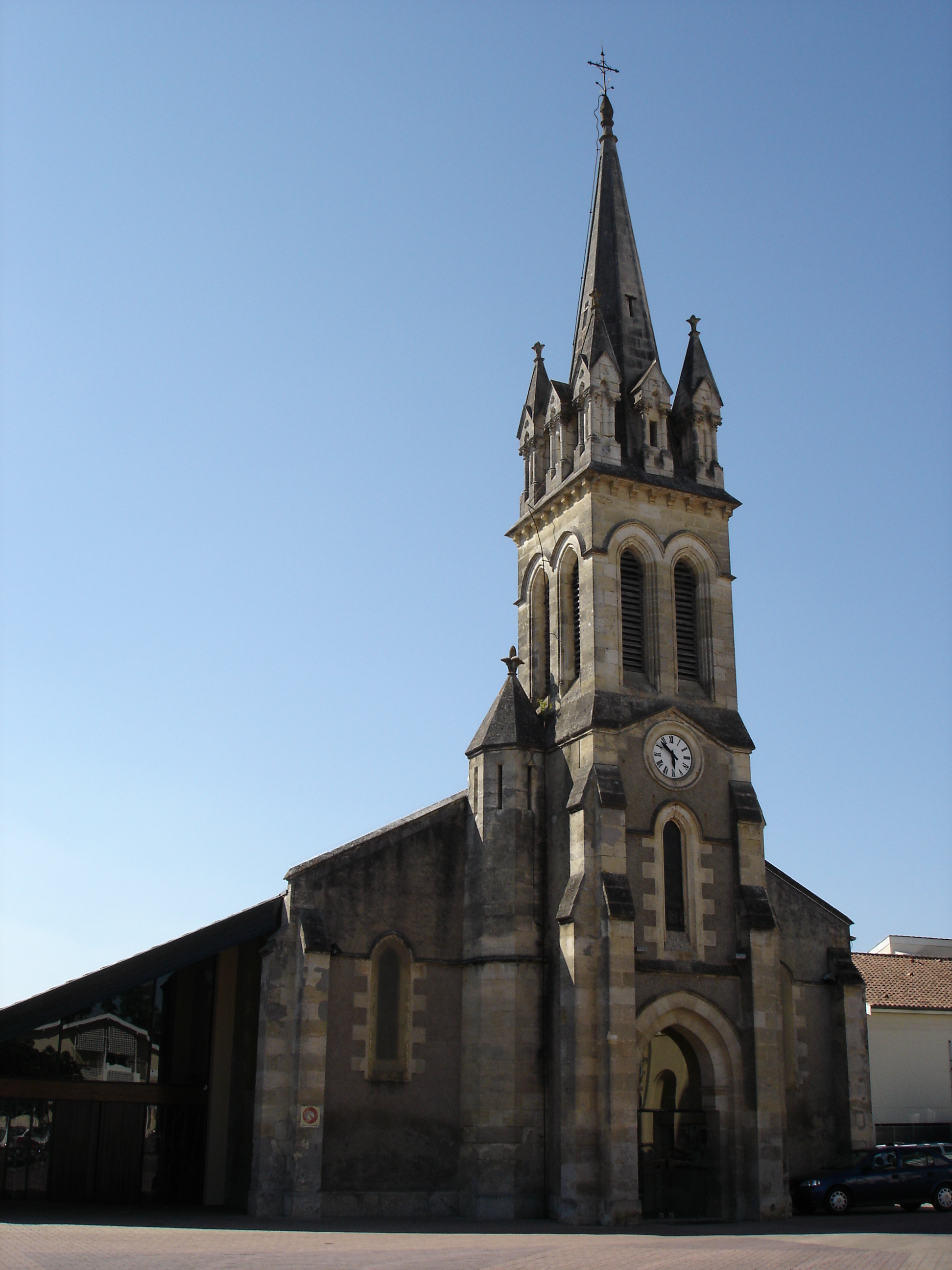 Extérieur de l'église de Cestas (Gironde - 33)